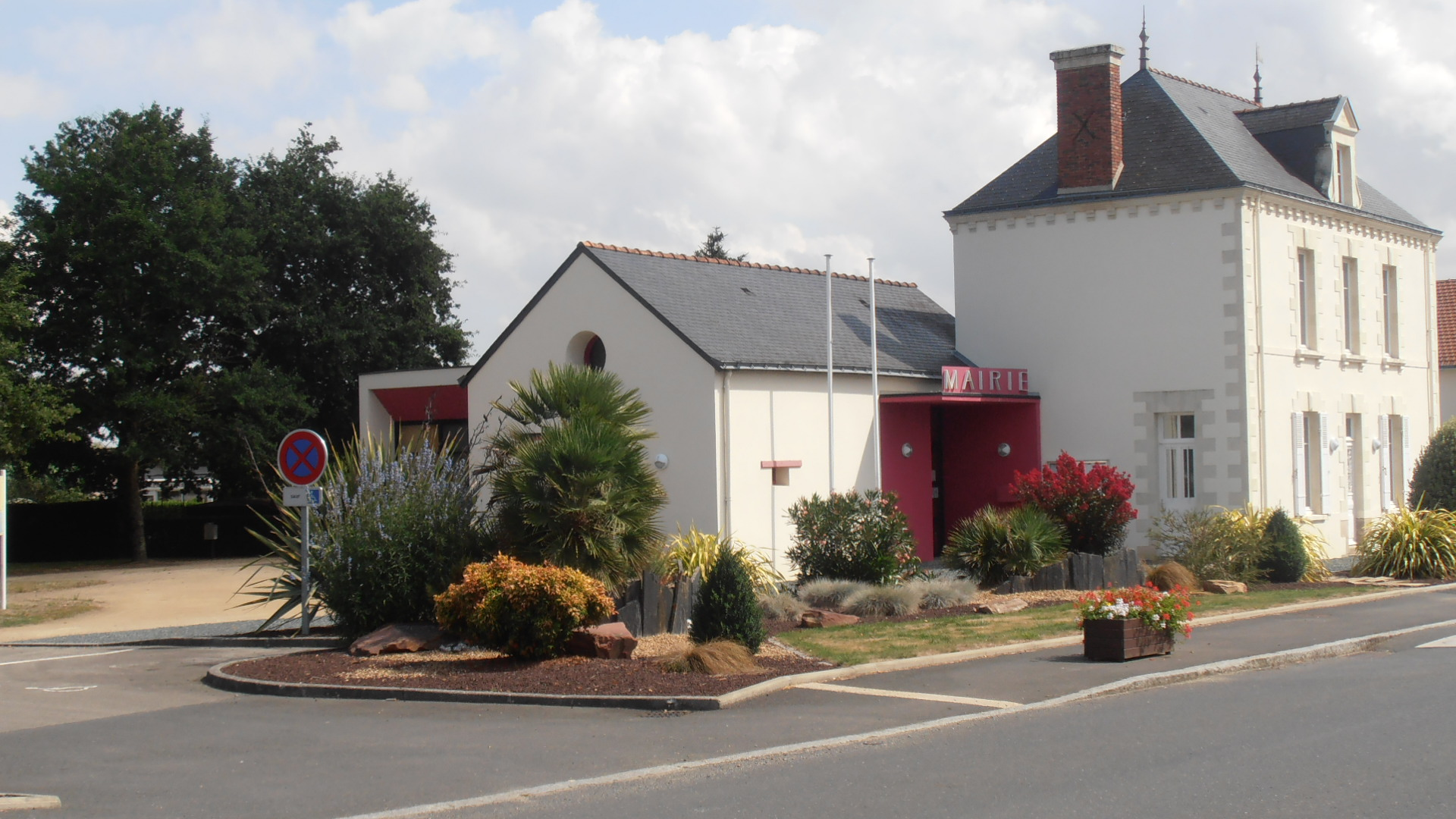 La mairie du village